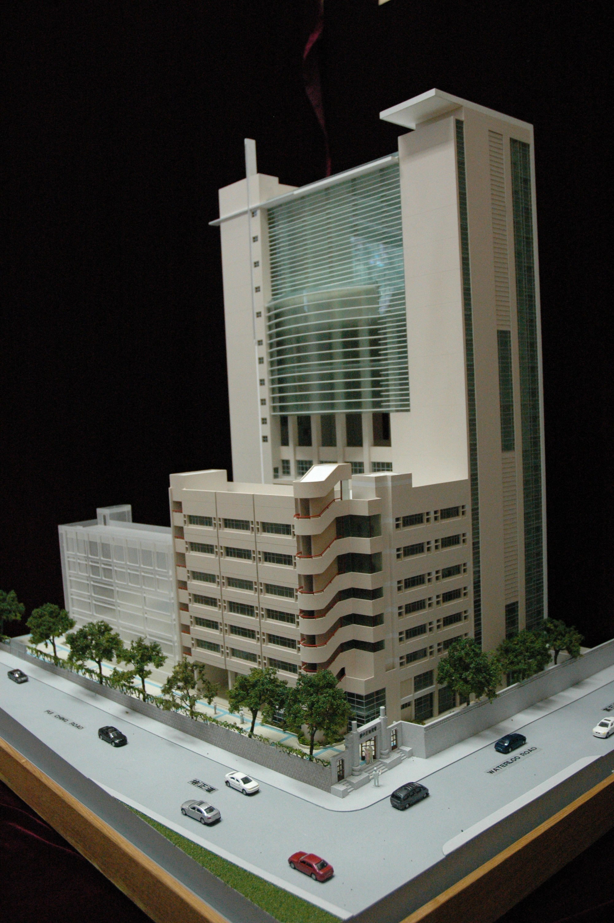 中文（香港）: 培正教育中心校園